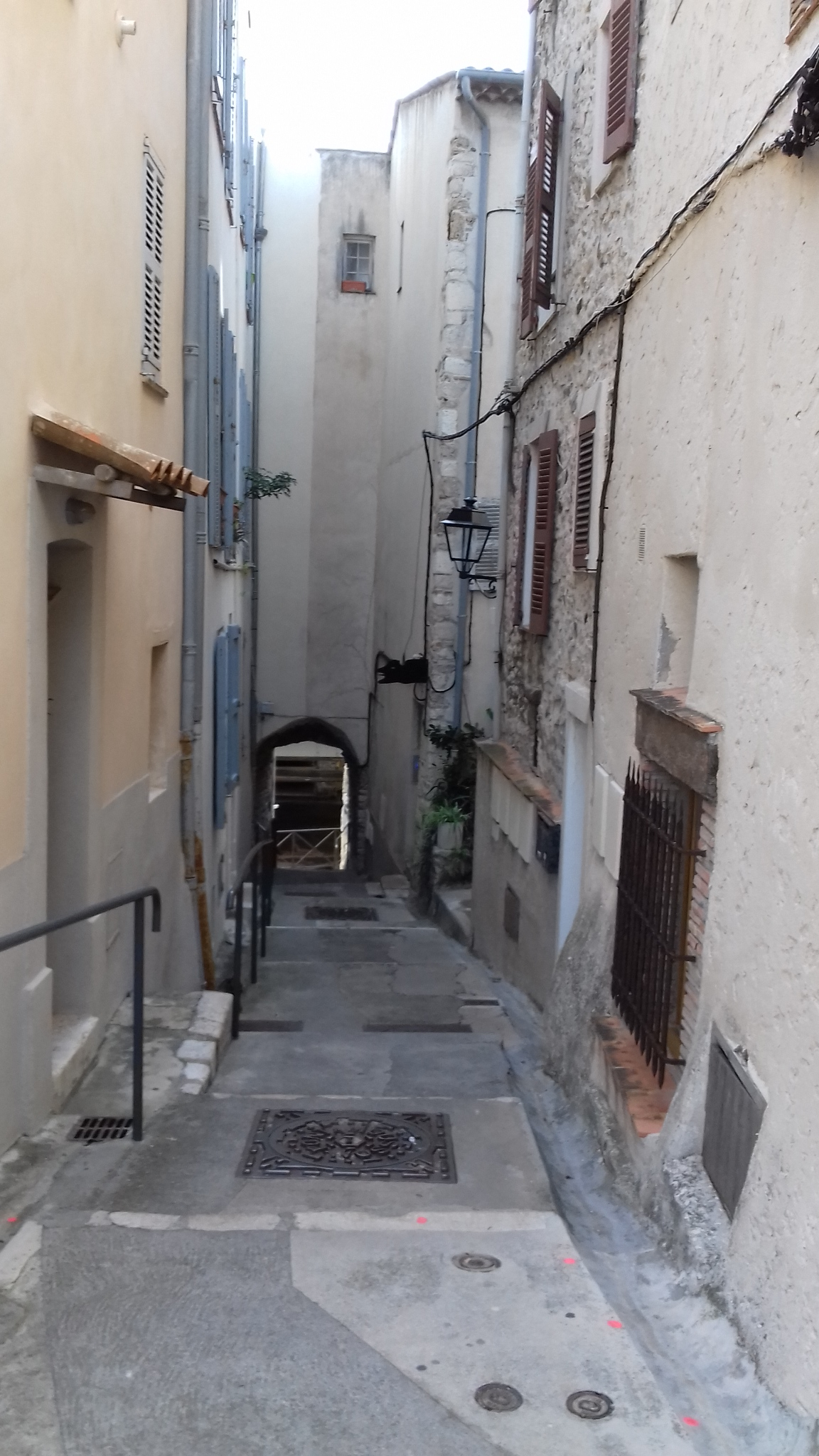 dans les rues d'Antibes